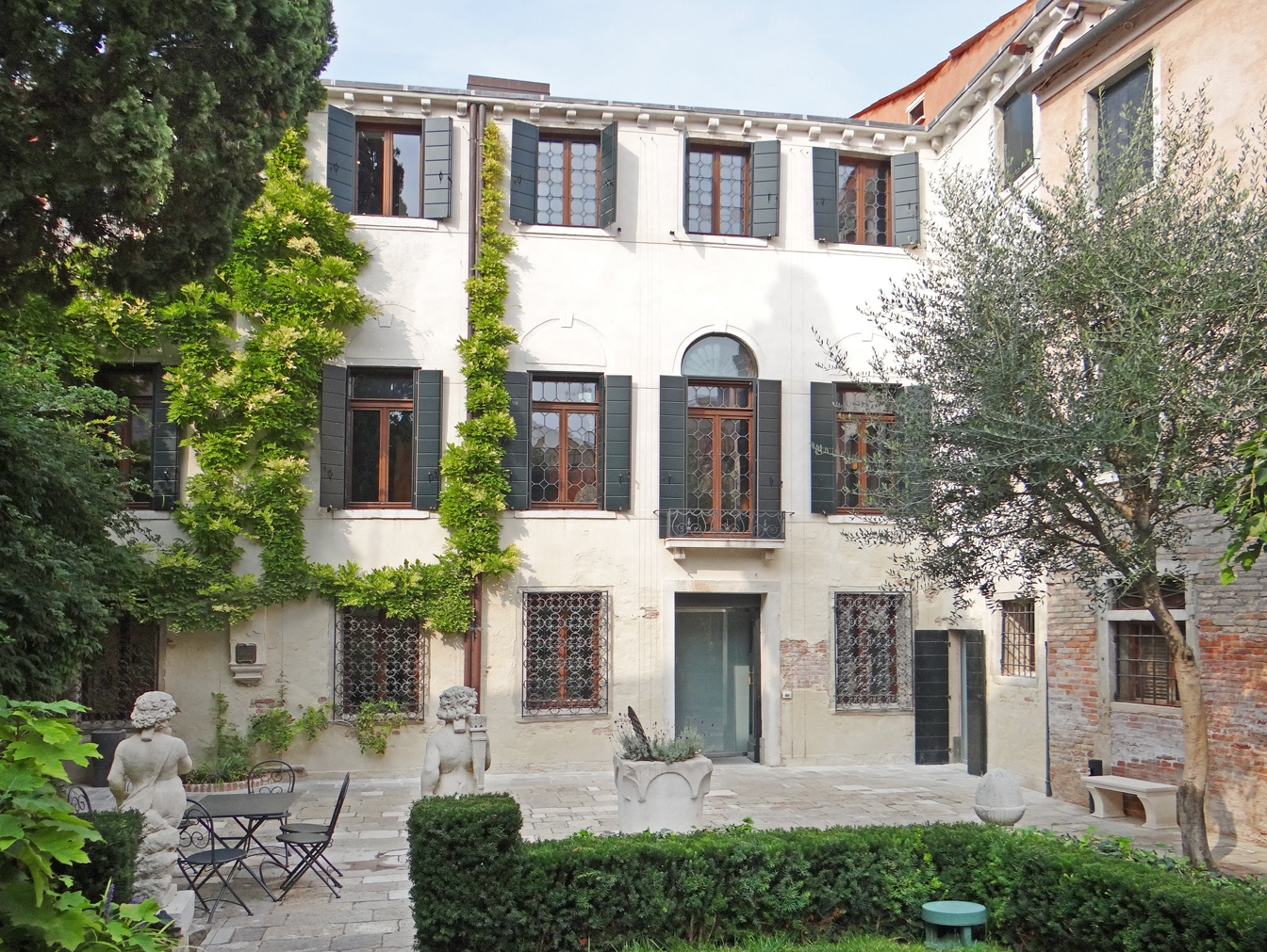 Le jardin et l'entrée du palazzetto Bru Zane Situé dans le quartier de San Stin, le casino Zane, édifié entre 1695 et 1697, fut pendant un siècle le palais de divertissement du palazzo Zane, construit à quelques dizaines de mètres. En 1682, l’atelier de Baldassare Longhena – célèbre architecte du baroque vénitien, achève la restructuration du palazzo Zane commandée par Dominico Zane. A la mort de ce dernier, son neveu et héritier Marino Zane. initie la construction du casino et de la bibliothèque pour préserver les collections de son oncle, qu’il s’était employé à enrichir. L’architecte Antonio Gaspari, issu de l’atelier de Longhena, eut pleine liberté pour concevoir le casino. À sa mort, son assistant Domenico Rossi poursuivit ses projets, épaulé par des artistes de renom. La décoration intérieure, très riche, est ainsi attribuée au célèbre stucateur Abbondio Stazio et la balustrade en bois qui surplombe la salle de bal proviendrait de l’atelier du sculpteur Andrea Brustolon. Les fresques sont – depuis peu – attribuées à Sebastiano Ricci. En 2006 une étude historique a été réalisée, en lien avec la Surintendance des beaux-arts de Venise et, en 2007, un vaste chantier de restauration a été engagé par la Fondation Bru. Le projet est double : réhabiliter le bâtiment dans l’esprit de l’époque et y créer un lieu dédié à la musique, qui était sa finalité première. La fondation Palazzetto Bru Zane – Centre de musique romantique française a été créée en janvier 2008 pour redonner vie à ce lieu grâce à la musique. Extraits du site officiel